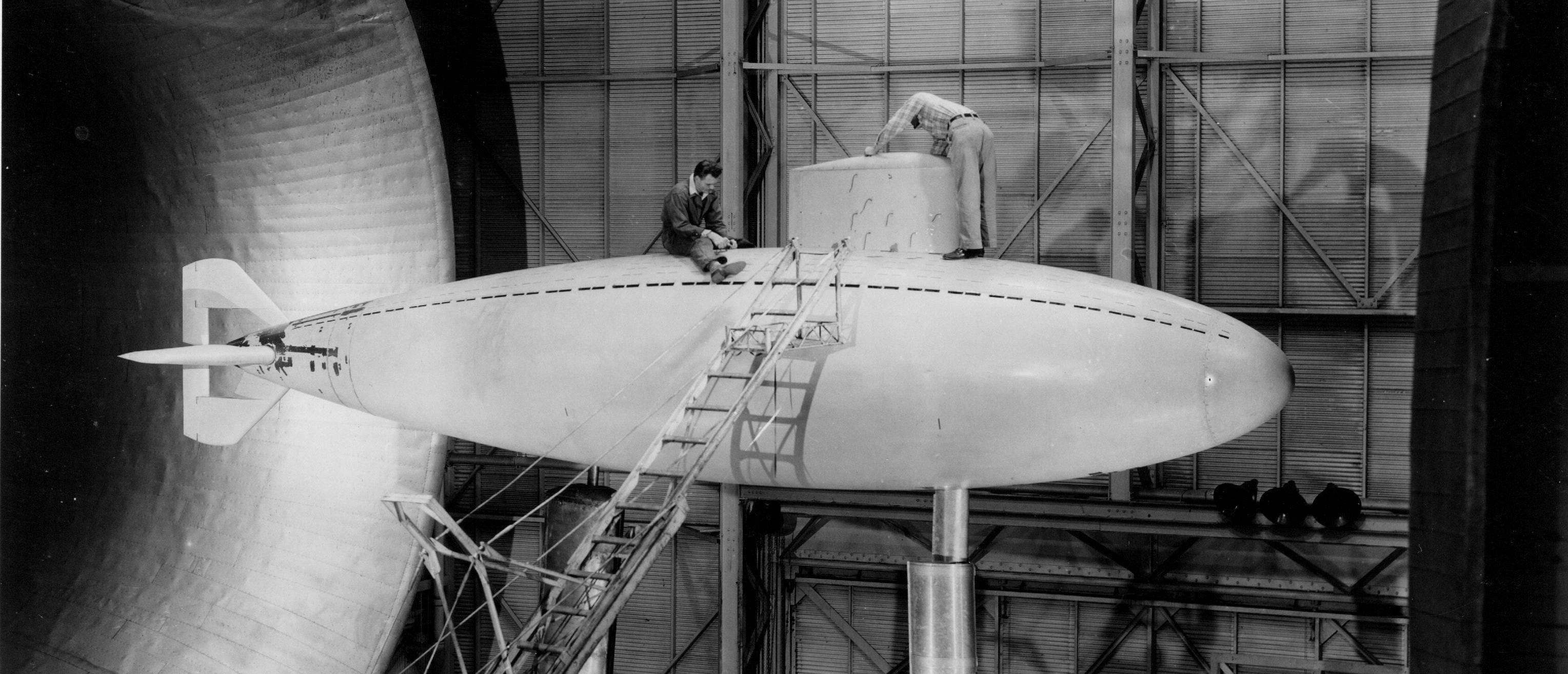 Modèle au 1/5ème du sous-marin américain Albacore en test dans la soufflerie 30 x 60 pieds de Langley.